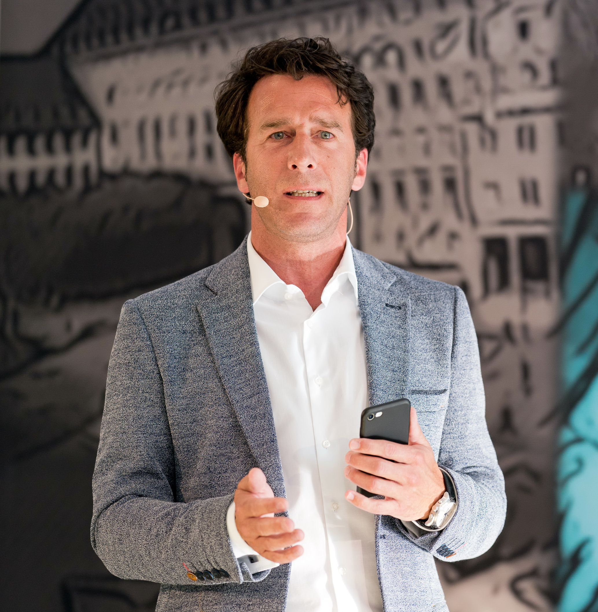 Eric Weik bei der Moderation des IHK-Wirtschaftsforums Bochum im Jahr 2019